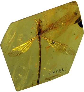 Inkluse einer Kleinlibelle (Zygoptera) der Überfamilie Coenagrionoidea aus der Königsberger Bernsteinsammlung.